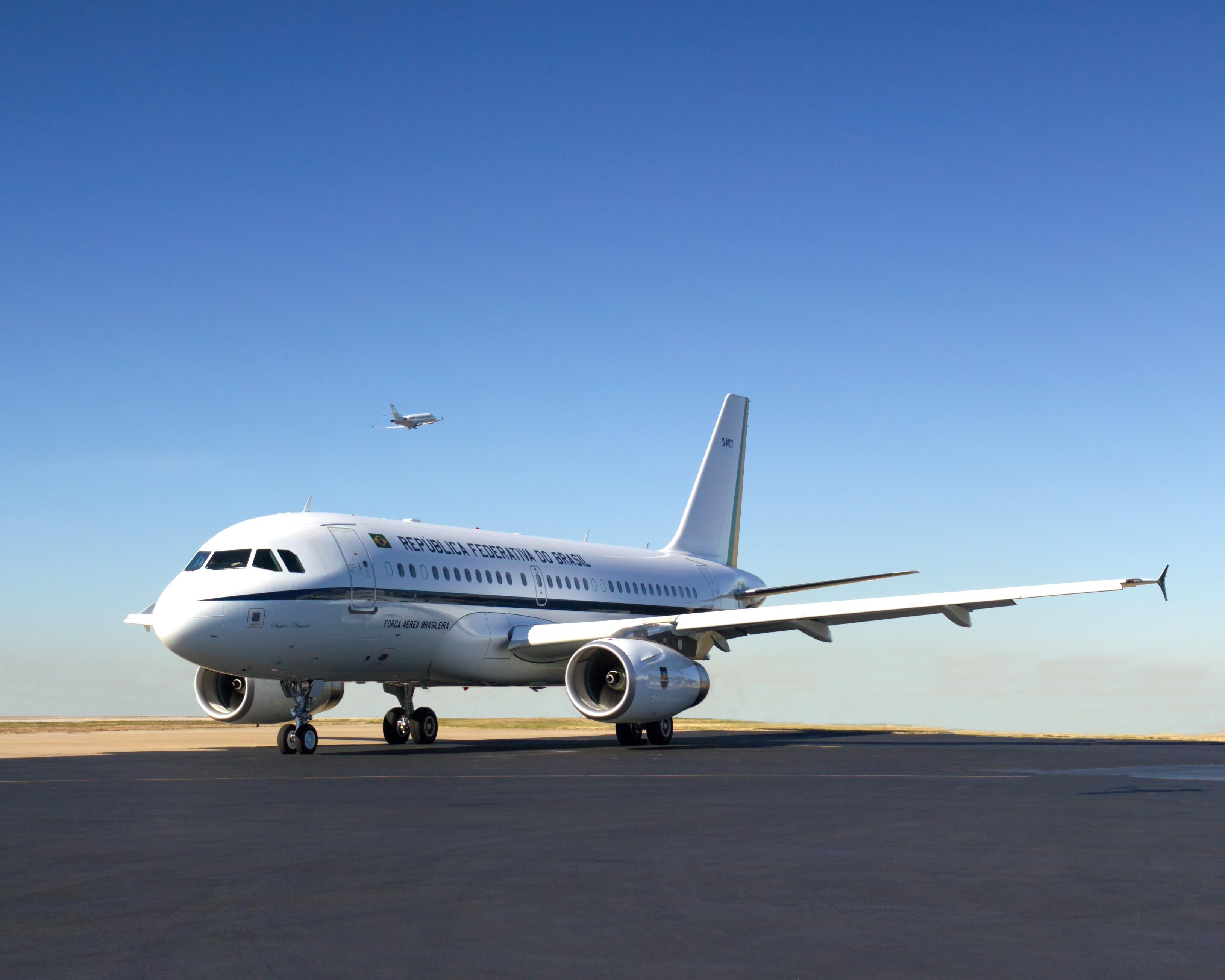 A Aeronave presidencial (FAB 001; Aerolula) brasileira.